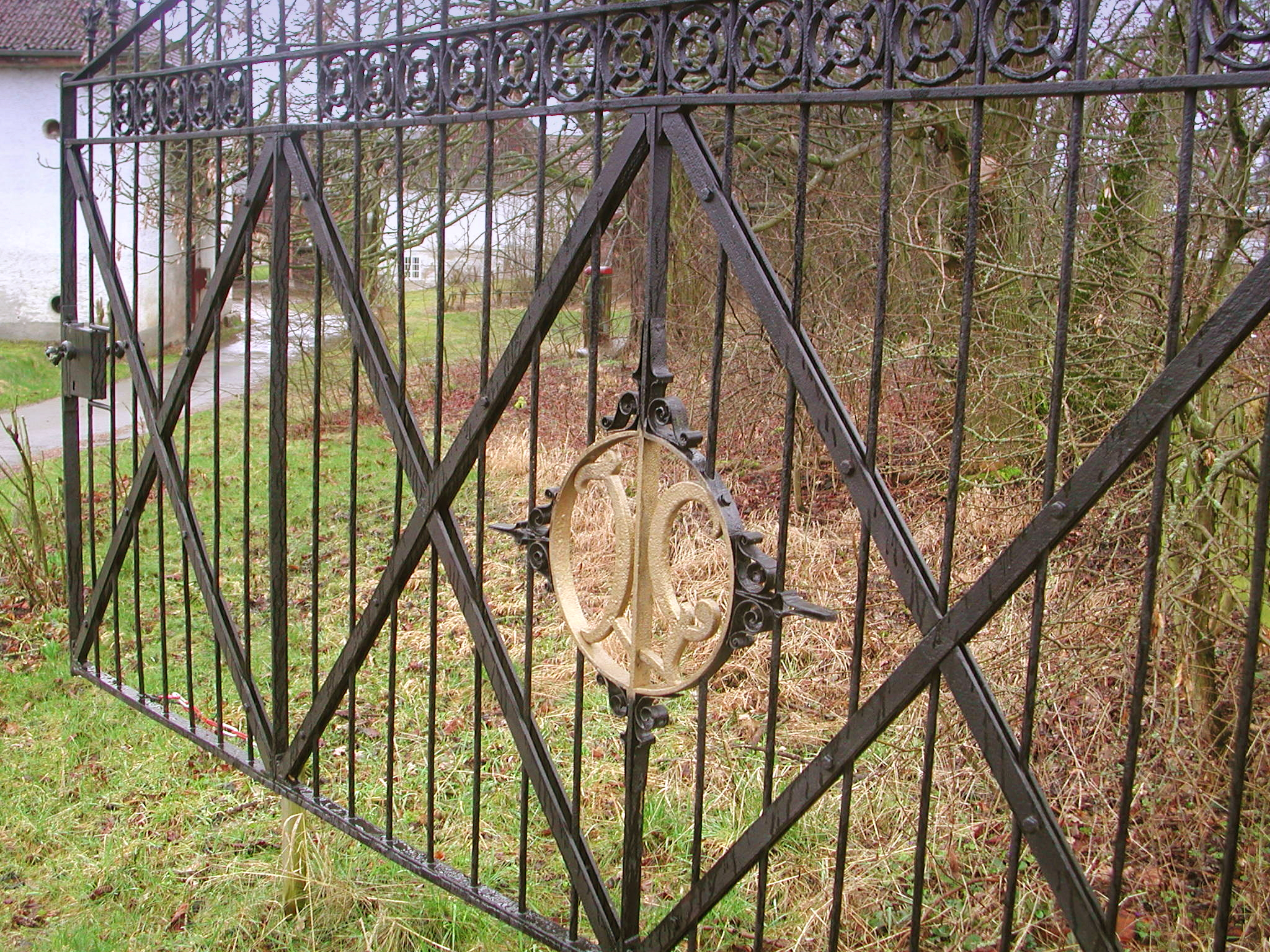 Gutshof Neudörfles in Coburg, Zufahrtstor mit Initiale "U" (Ulmann) 1865